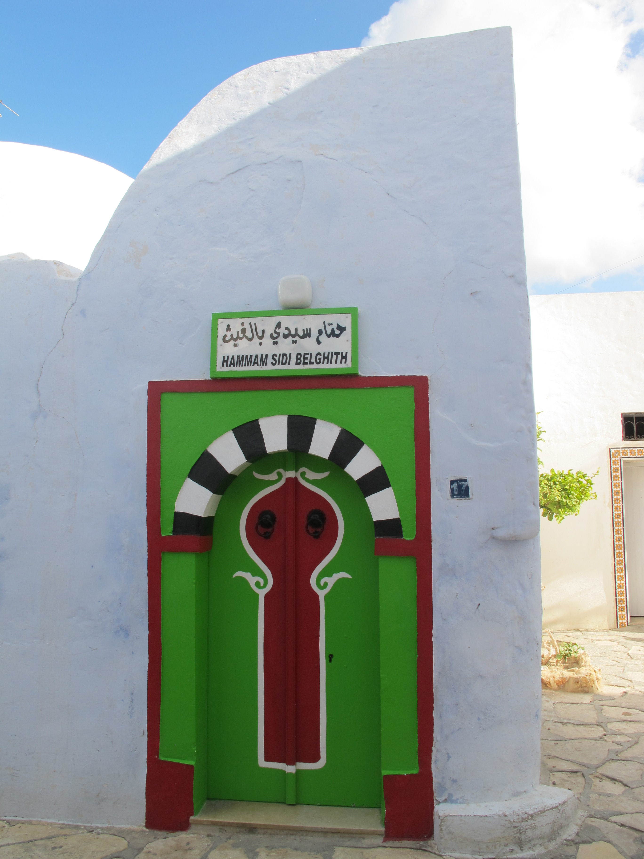 Hammamet, Tunesien